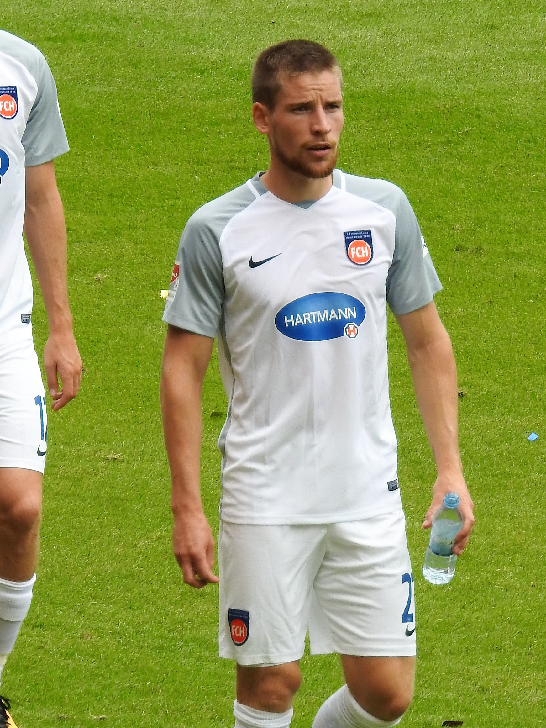 Kolja Pusch Heidenheim